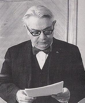 Edmund Osmańczyk podczas obrony doktoratu na opolskiej WSP